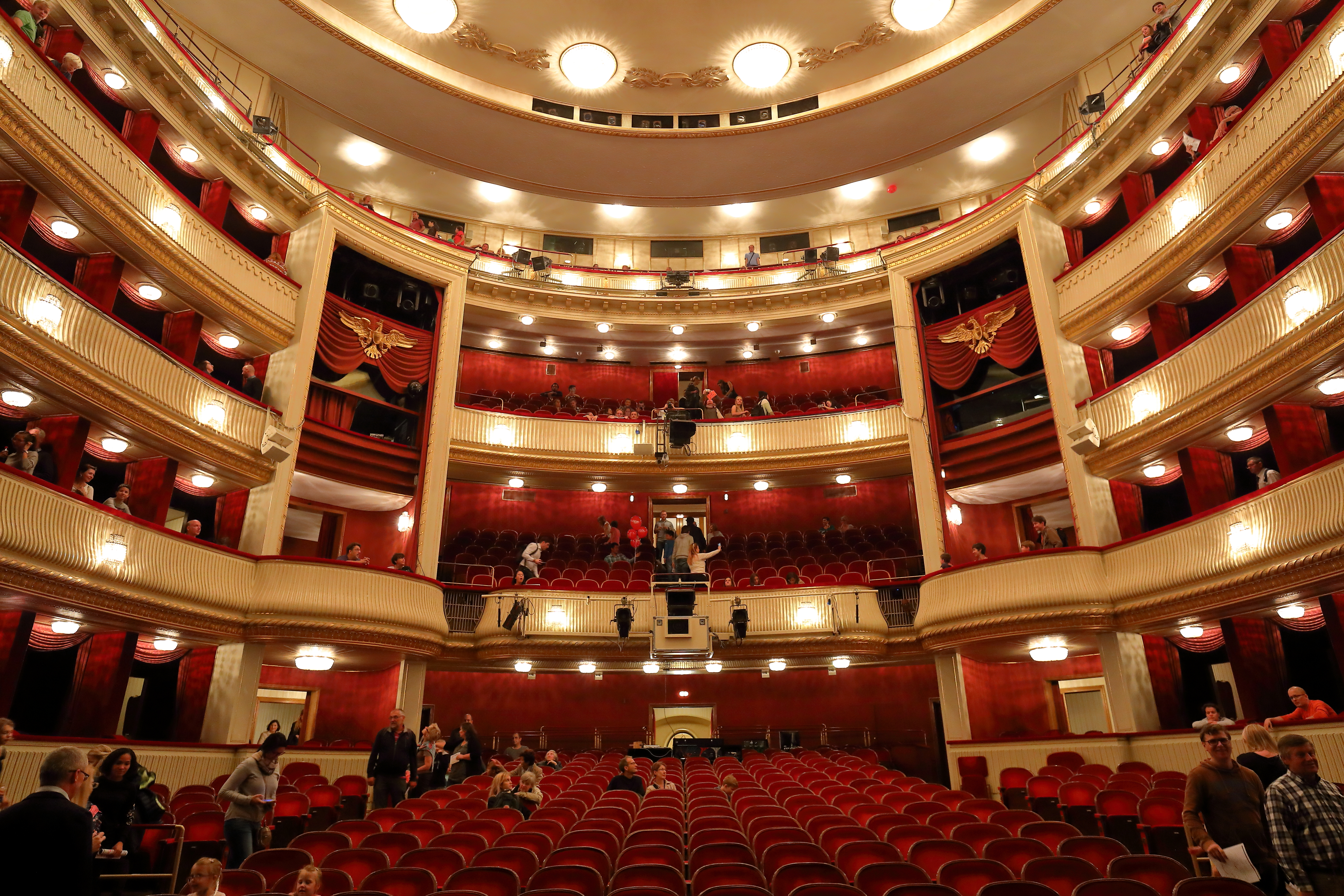 Zuschauerraum des Burgtheaters in der österreichischen Bundeshauptstadt Wien.Der Spatenstich des neuen Burgtheaters erfolgte am 16. Dezember 1874 und die Eröffnung am 14. Oktober 1888. Die Pläne stammten von Gottfried Semper und Carl von Hasenauer (Fassade, Innengestaltung), wobei der Zuschauerraum wegen schlechter Akustik 1897 umgebaut wurde. Am 12. März 1945 erhielt das Burgtheater einen Bombentreffer und am 12. April 1945 einen Artillerietreffer mit anschließendem Brand. Der Wiederaufbau erfolgte von 1948 bis 1955 durch den Architekten Michel Engelhart. Dabei wurden auch die akustischen Mängel und die schlechten Sichtverhältnisse im Zuschauerraum behoben (Weglassung der Hofloge, Einfügung von zwei Rängen).